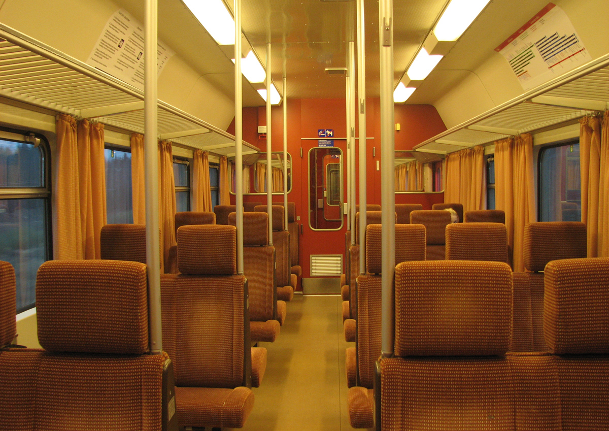 Eil-lähiliikennevaunun sisusta.